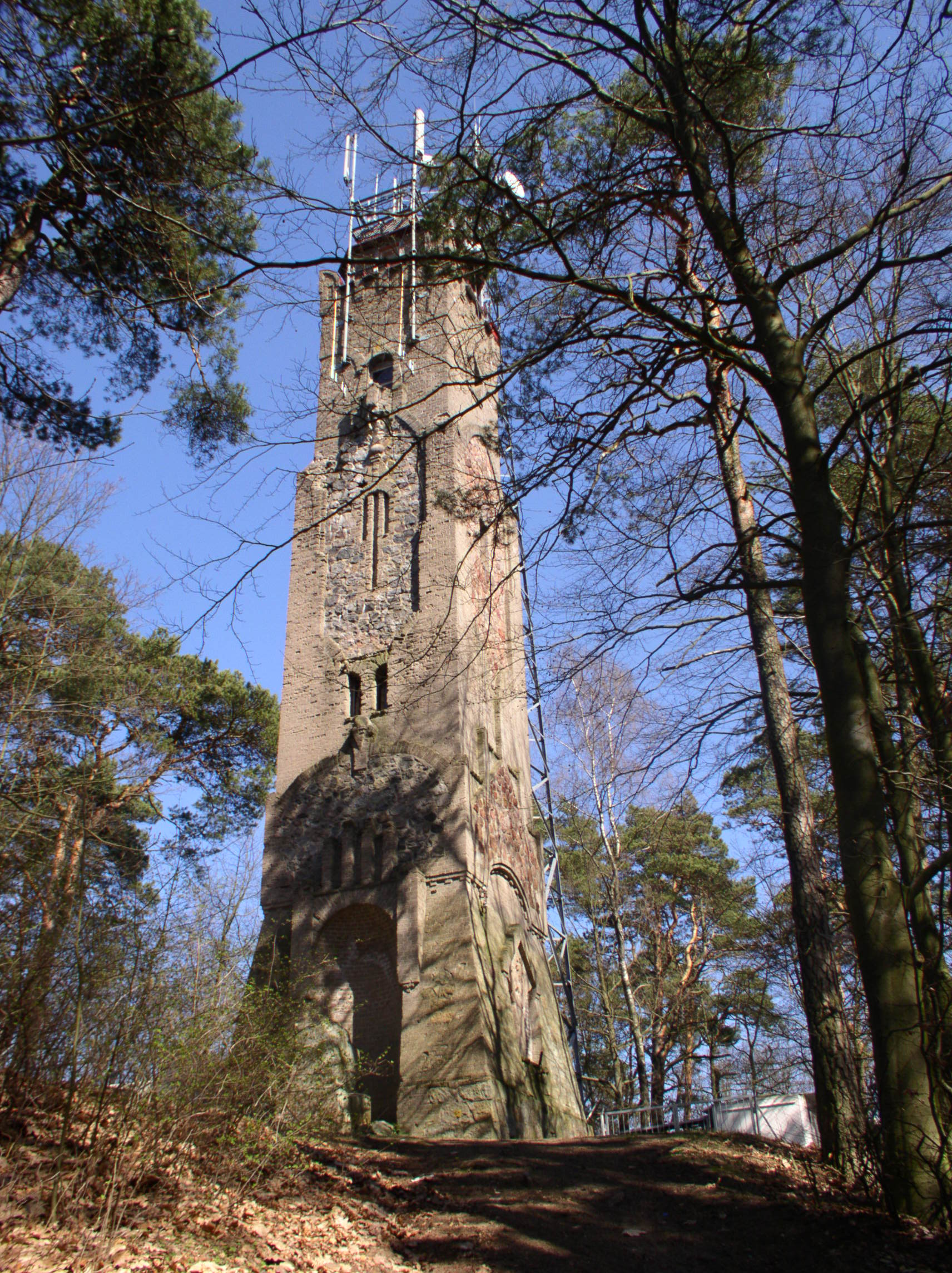 Wieża Bismarcka w Okonku niem. Ratzebuhr in Pommern (obecna nazwa Wieża Tecława) - stoi na Górze Tecława. Budowę tej 24 metrowej wieży zainicjowało Zrzeszenie Użyteczności Publicznej w Okonku pod przewodnictwem Naczelnika Poczty Ernsta Nitschke ze Szczecinka. Głównym wykonawcą prac budowlanych była firma Steltera z Okonka. Na miejsce budowy wieży wybrano, leżące na północ od miasta, Wzgórze Tecława (191 m.n.p.m.). Kamień węgielny pod budowę położono 01.04.1908r. Koszt budowy wyniósł 12.000 marek, a całą inwestycję sfinansowano z dobrowolnych datków, loterii oraz reklamy. Za materiał budowlany posłużyła cegła i beton (wiązanie krzyżowe) oraz kamienie granitowe (mur cyklopowy). Drewnianymi schodami (86 stopni) można było wejść na platformę widokową. Na wieży przymocowano płaskorzeźbę Bismarcka z brązu, wykonaną w odlewni w Mannheim. Okna herbowe oprawiono kolorowym szkłem. Przed wieżą postawiono 4 metrowy pomnik obelisk z orłem ku czci poległych. W uroczystościach poświęcenia wieży w dniu 23.08.1908r. udział wzięły liczne Związki i mieszkańcy Okonka, równocześnie odbyło się uroczyste odsłonięcie pomnika oraz nadanie "Orderu Orła" 4 klasy burmistrzowi Semmowi. Wieczorem na wieży dokonano inauguracyjnego rozpalenia "ognia ku czci Bismarcka".